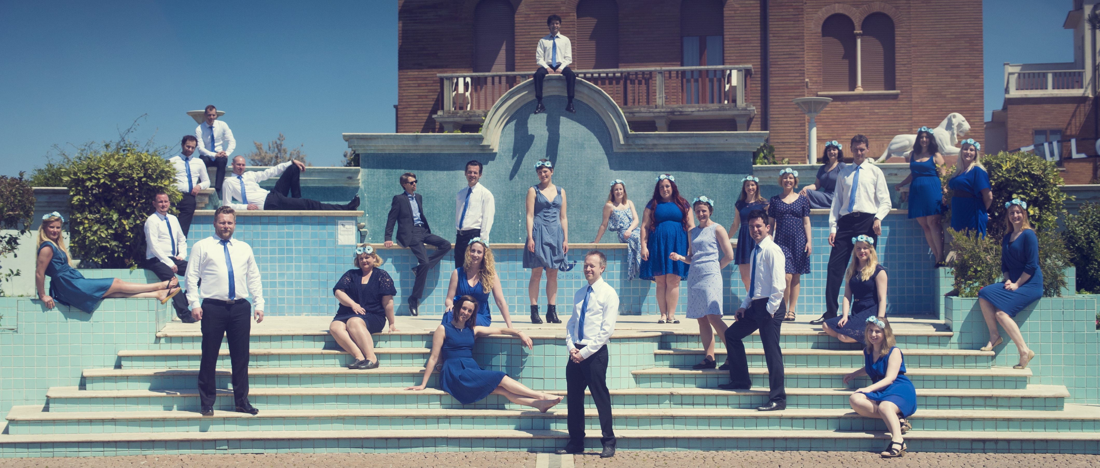 Gruppfoto av Stockholms universitetskör, våren 2016. Tagen i Cattolica, Italien.